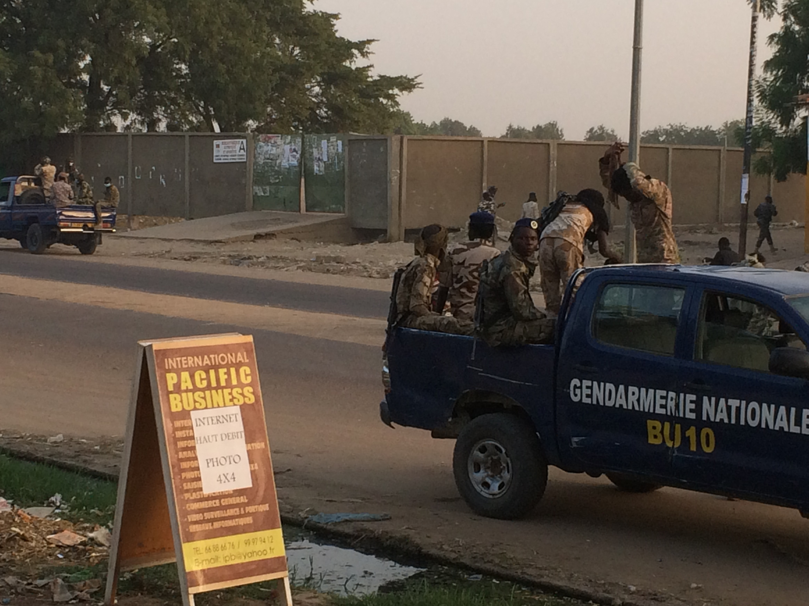 Le stade municipal du 7e arrondissement de ville de N'Djamena, Tchad, le 17 novembre 2016. (VOA/André Kodmadjingar)